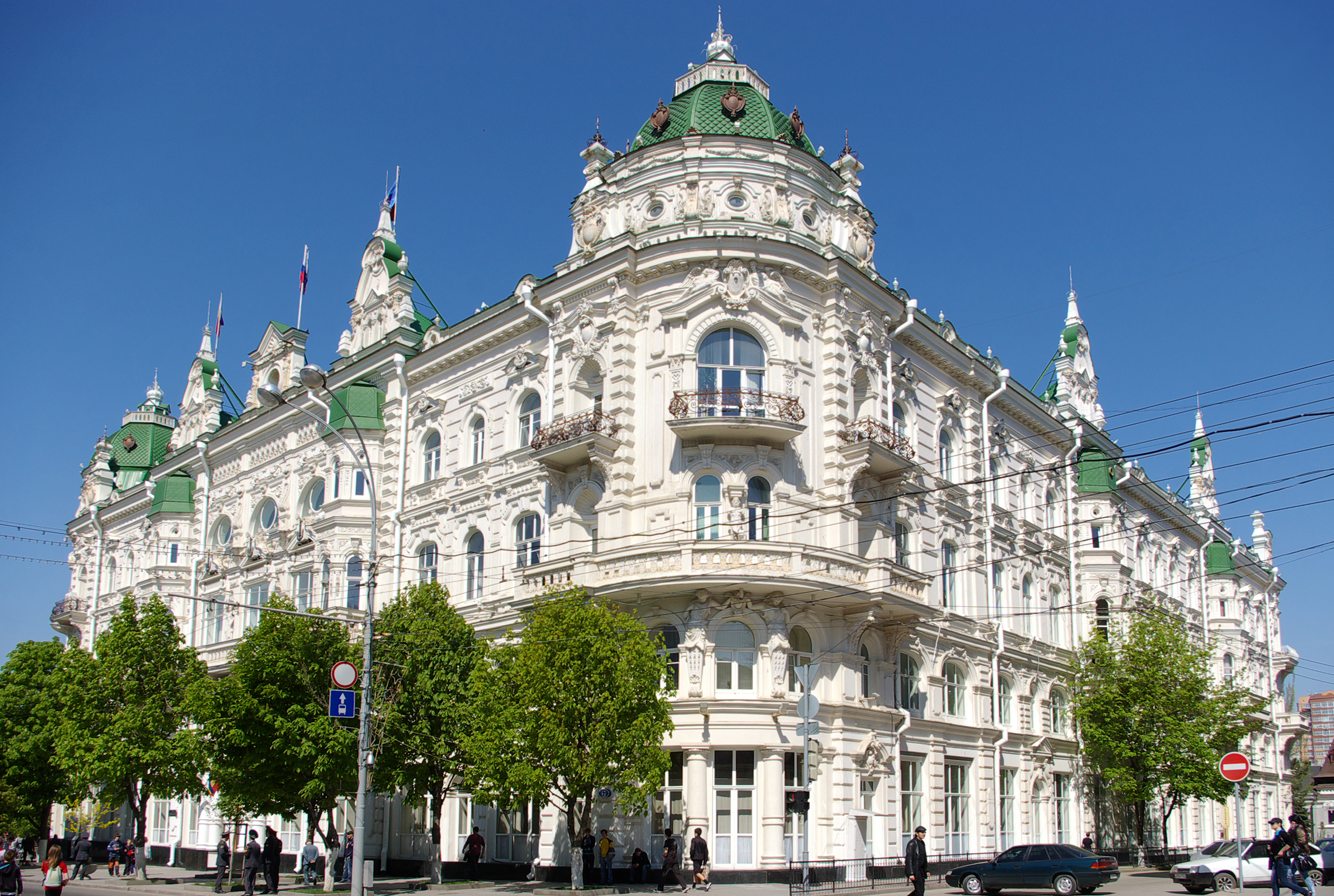 Здание Думы городской: улица Большая Садовая, 47 (49), Ростов-на-Дону, Ростовская область